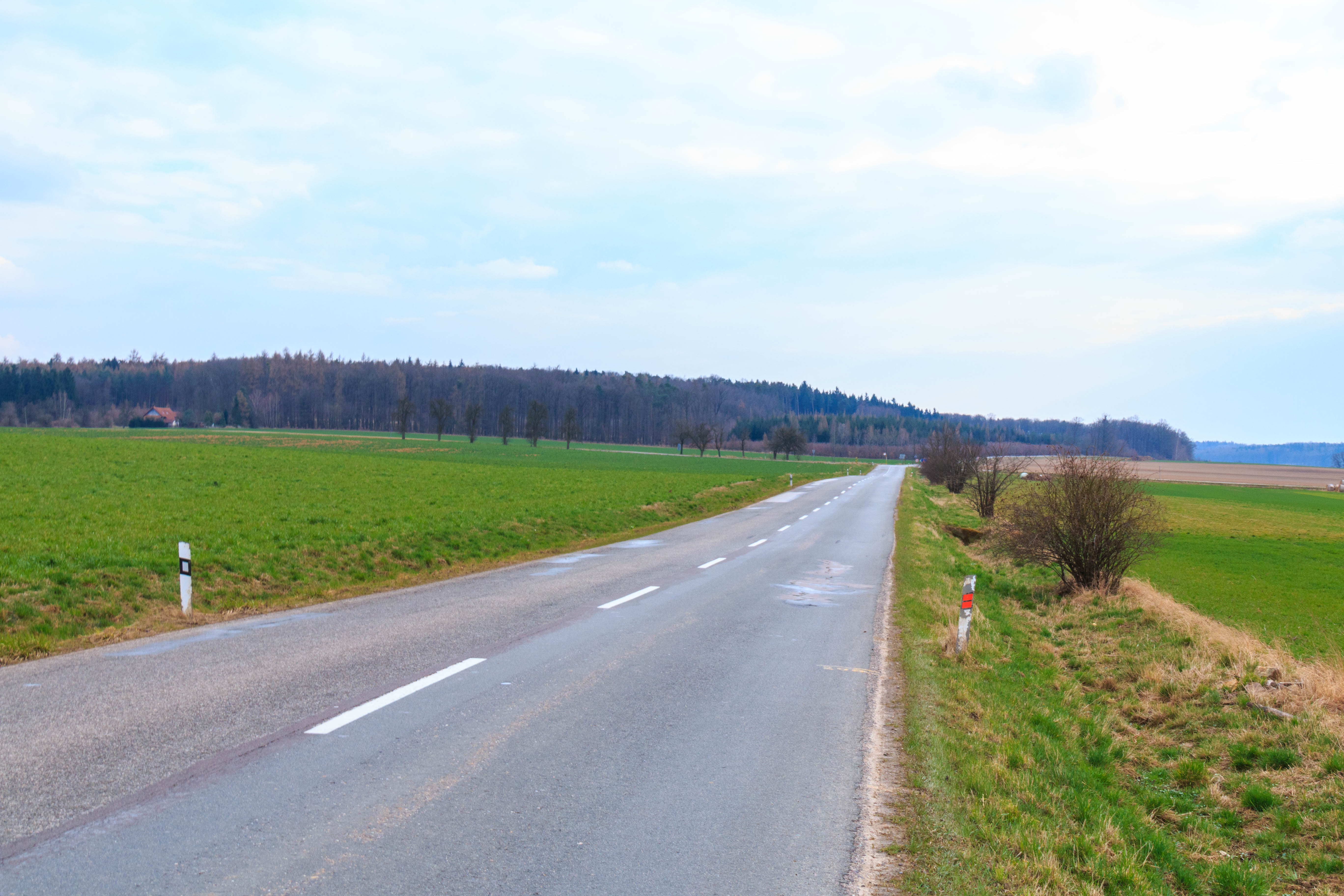 Stračovský bor pohled ze silnice od Stračova